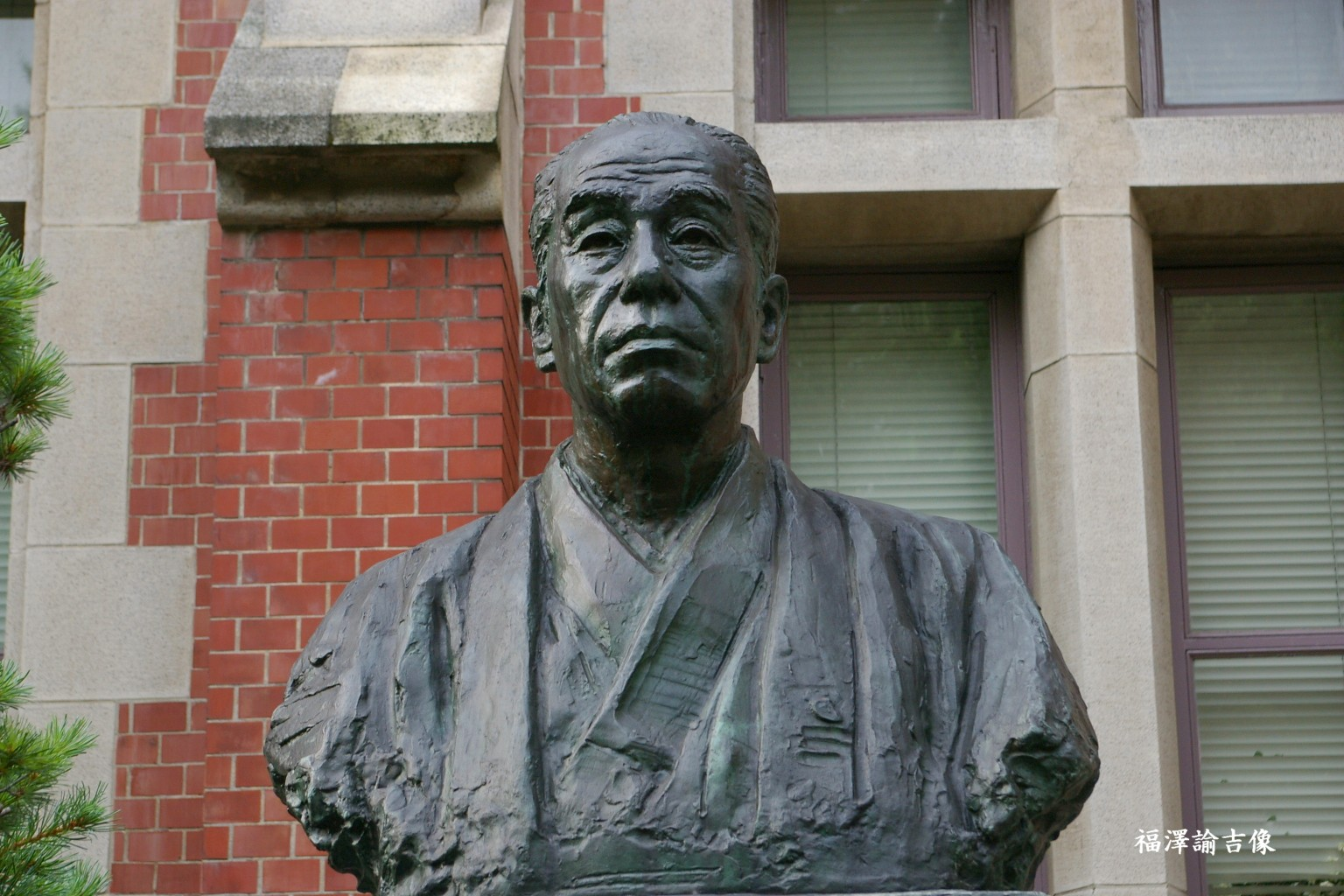 2009.5東京都内で塾生 (talk)が撮影